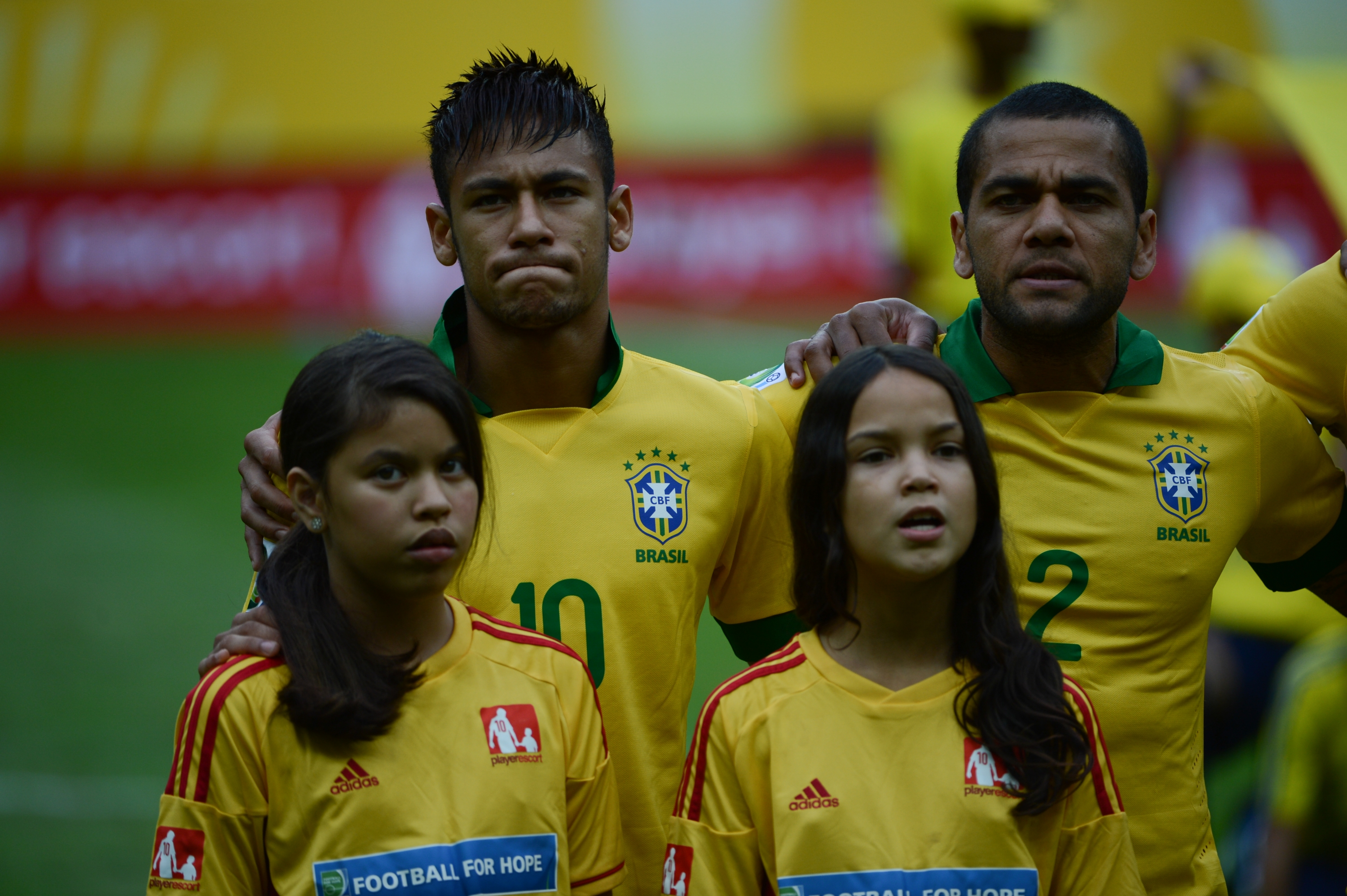 Jogo entre Brasil e Japão abre a Copa das Confederações